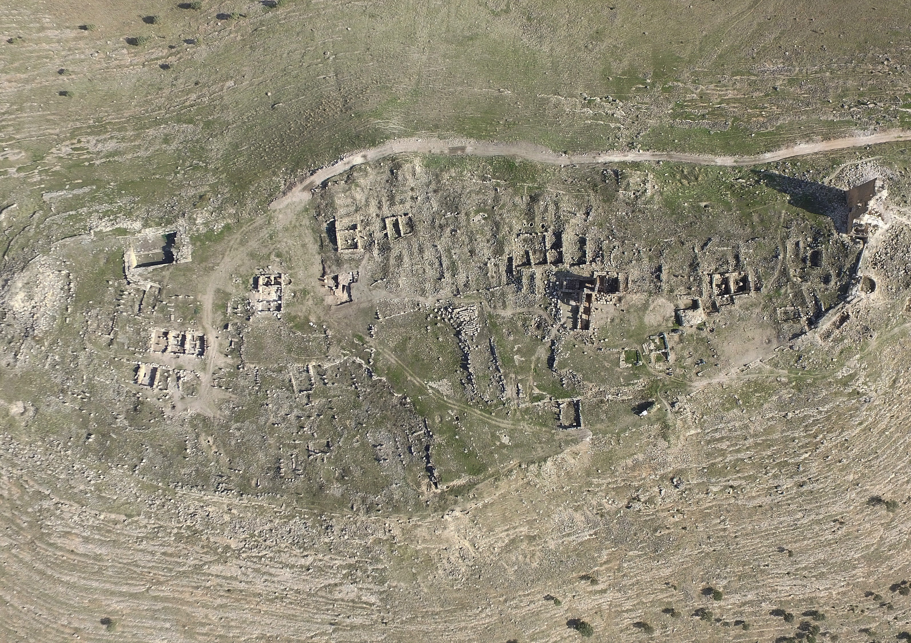 Zerzevan Kalesi'nin havadan görünümü (detay)